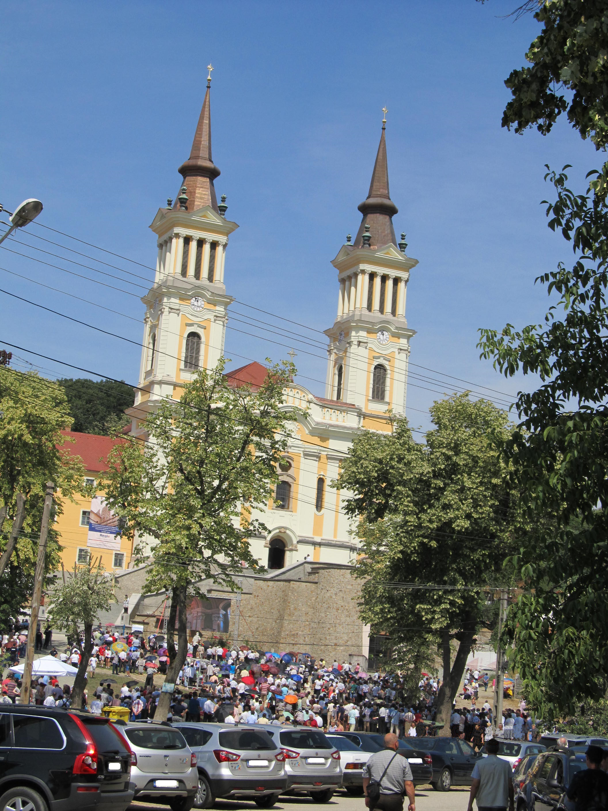 Wallfahrtsbasilika Maria Radna in Lipova, Rumänien.